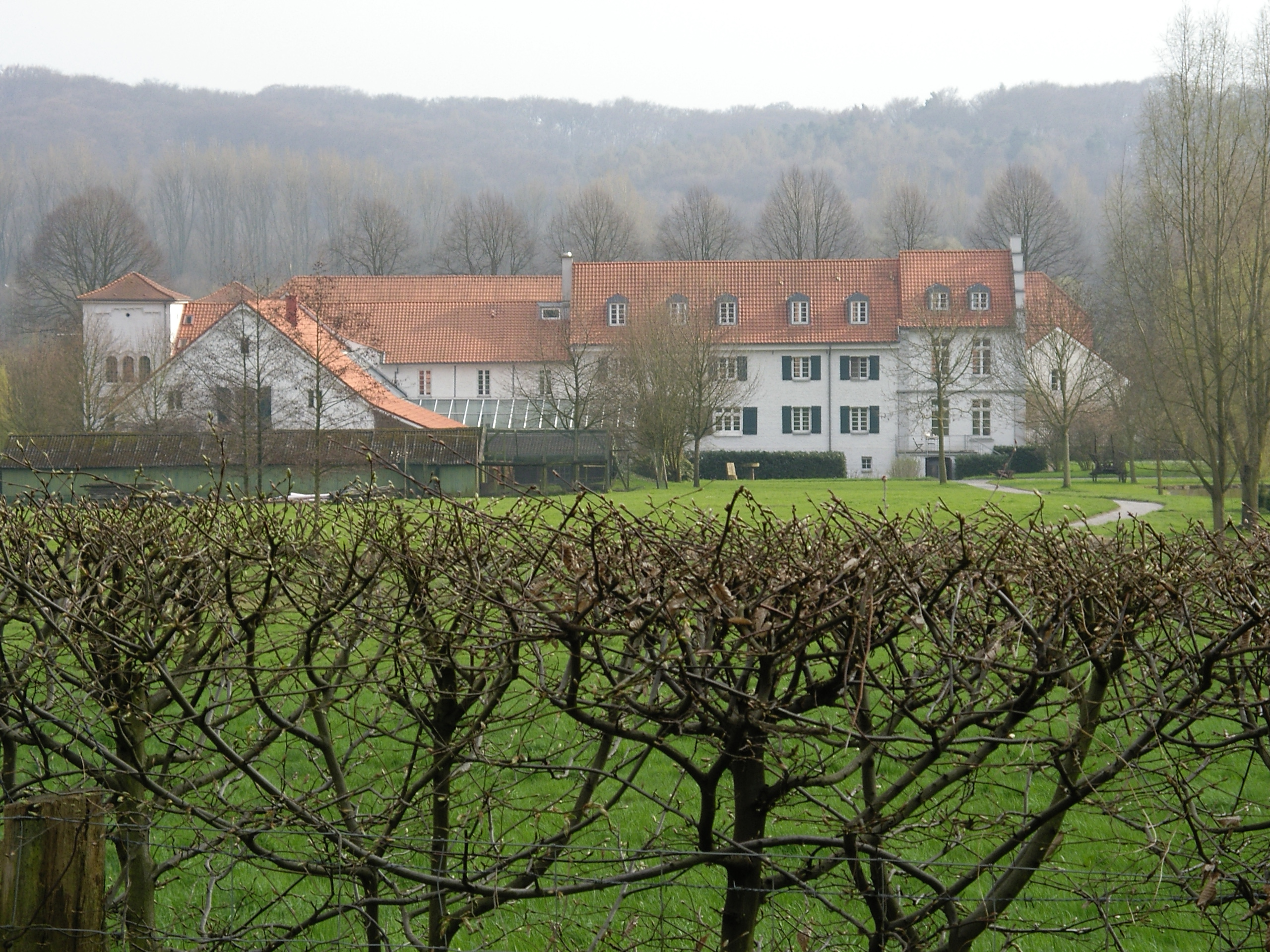 Erkrath - Hofanlage Haus Morp - von Bahnstrecke aus gesehen